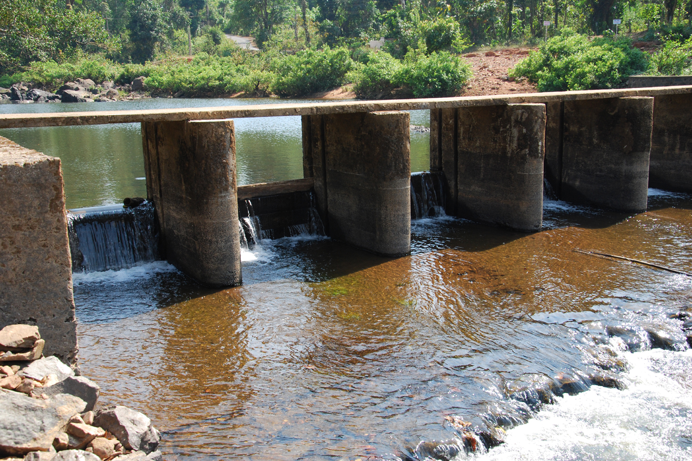 ಕನ್ನಡ: Atishaya kshetra